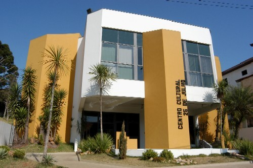 Vista do Centro Cultural 25 de Julho de Erechim.